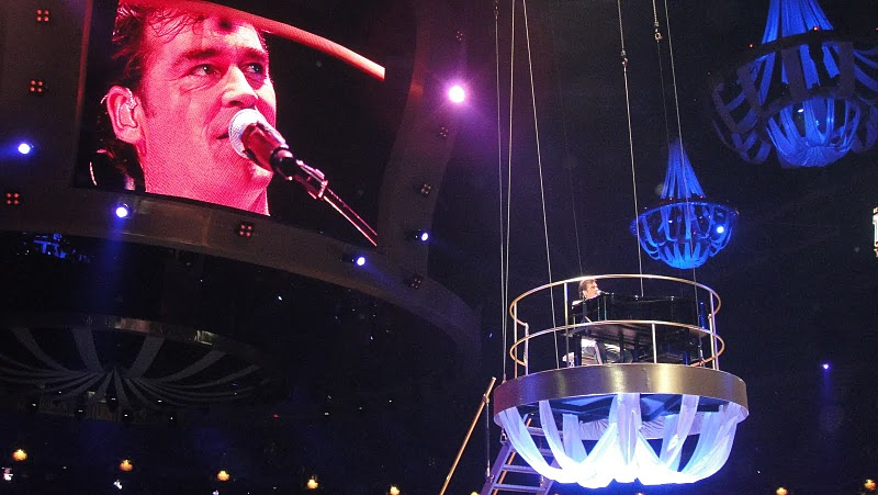 Jeroen van der Boom op piano